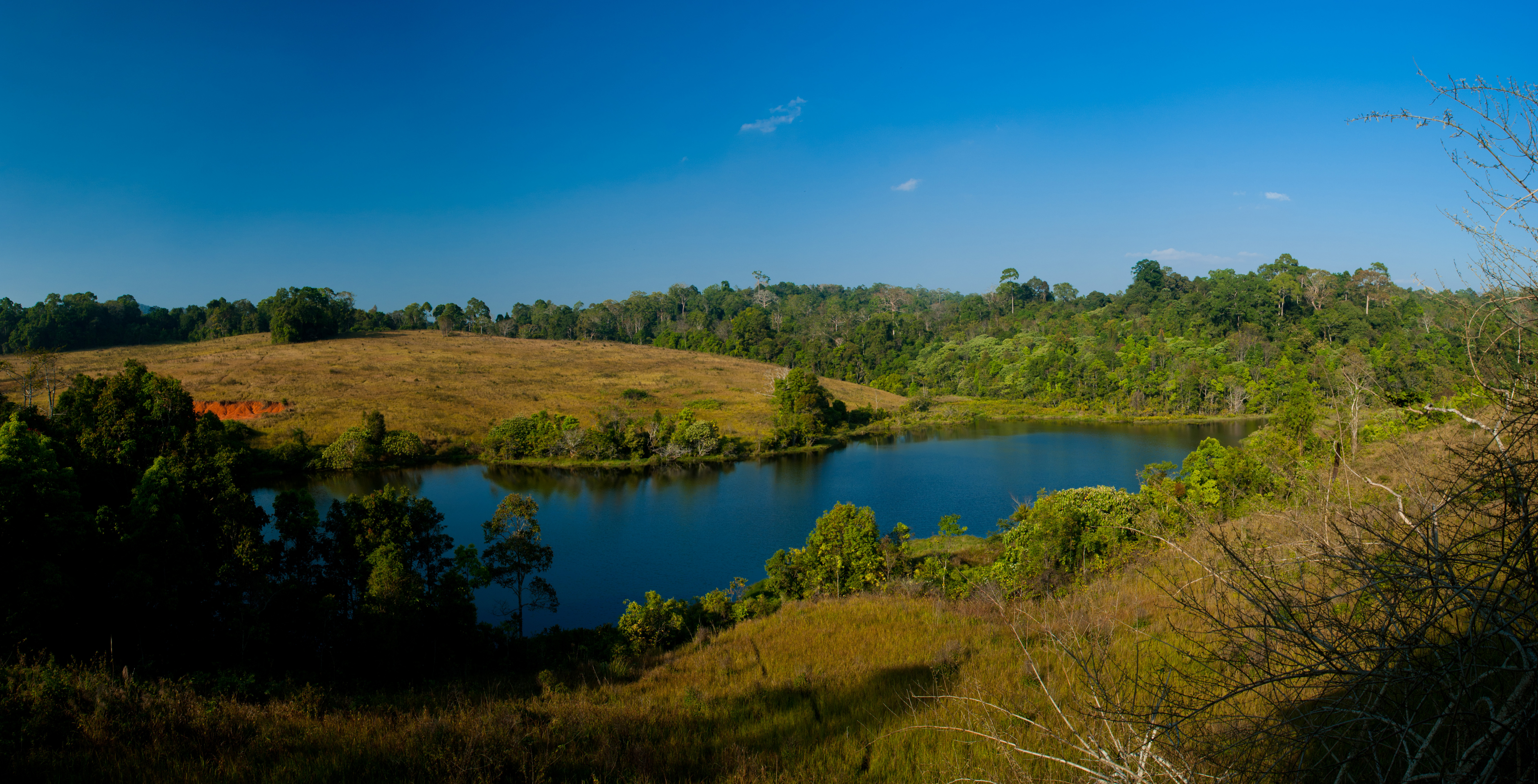 หนองผักชี